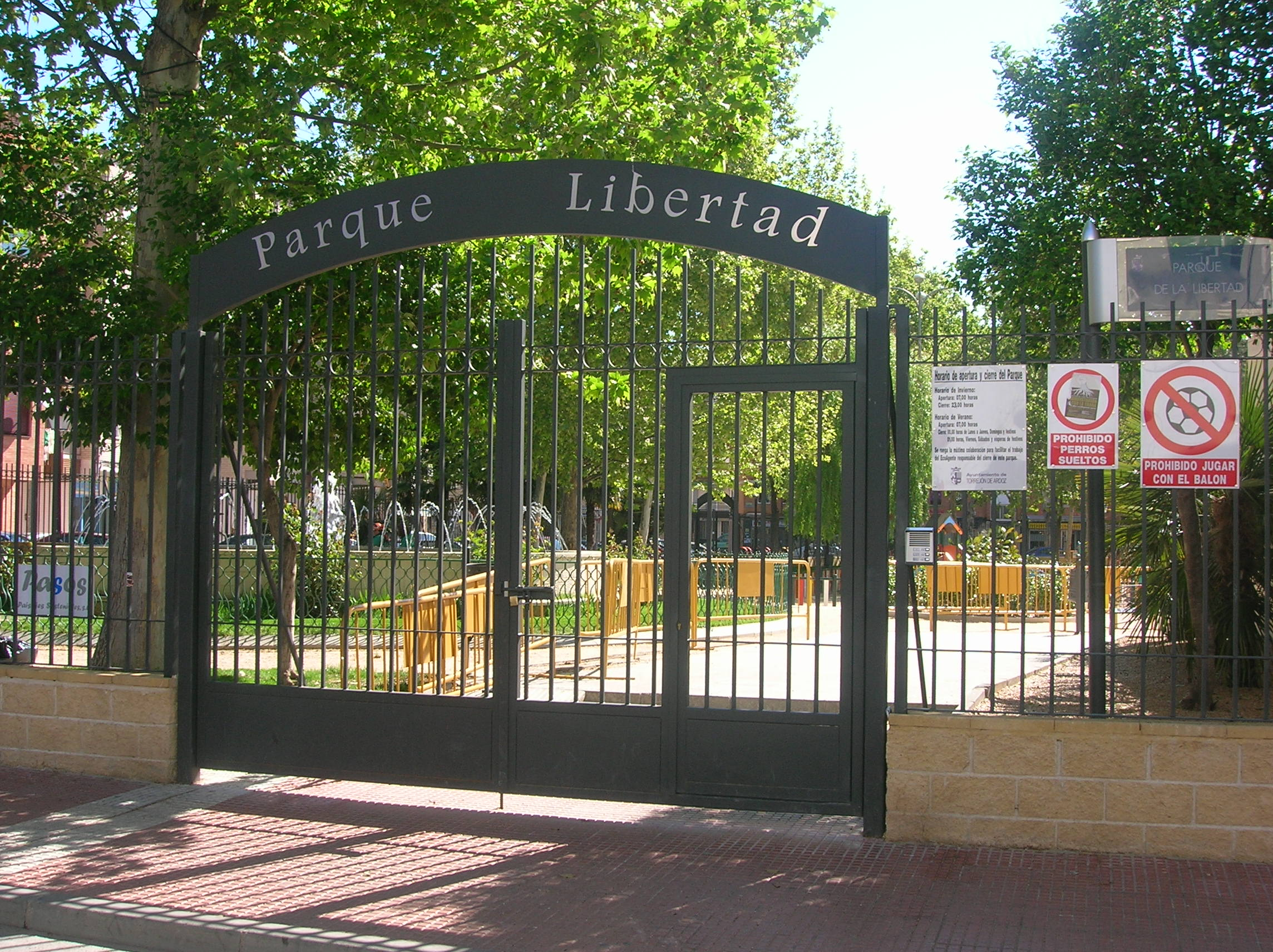 Puerta de entrada del Parque de la Libertad, recientemente cercado, en Torrejón de Ardoz, Comunidad autónoma de Madrid, España.